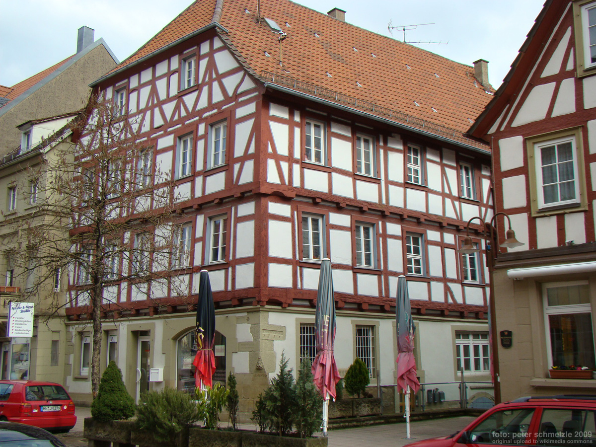 Historisches Gebäude Brettener Straße 7 in Eppingen